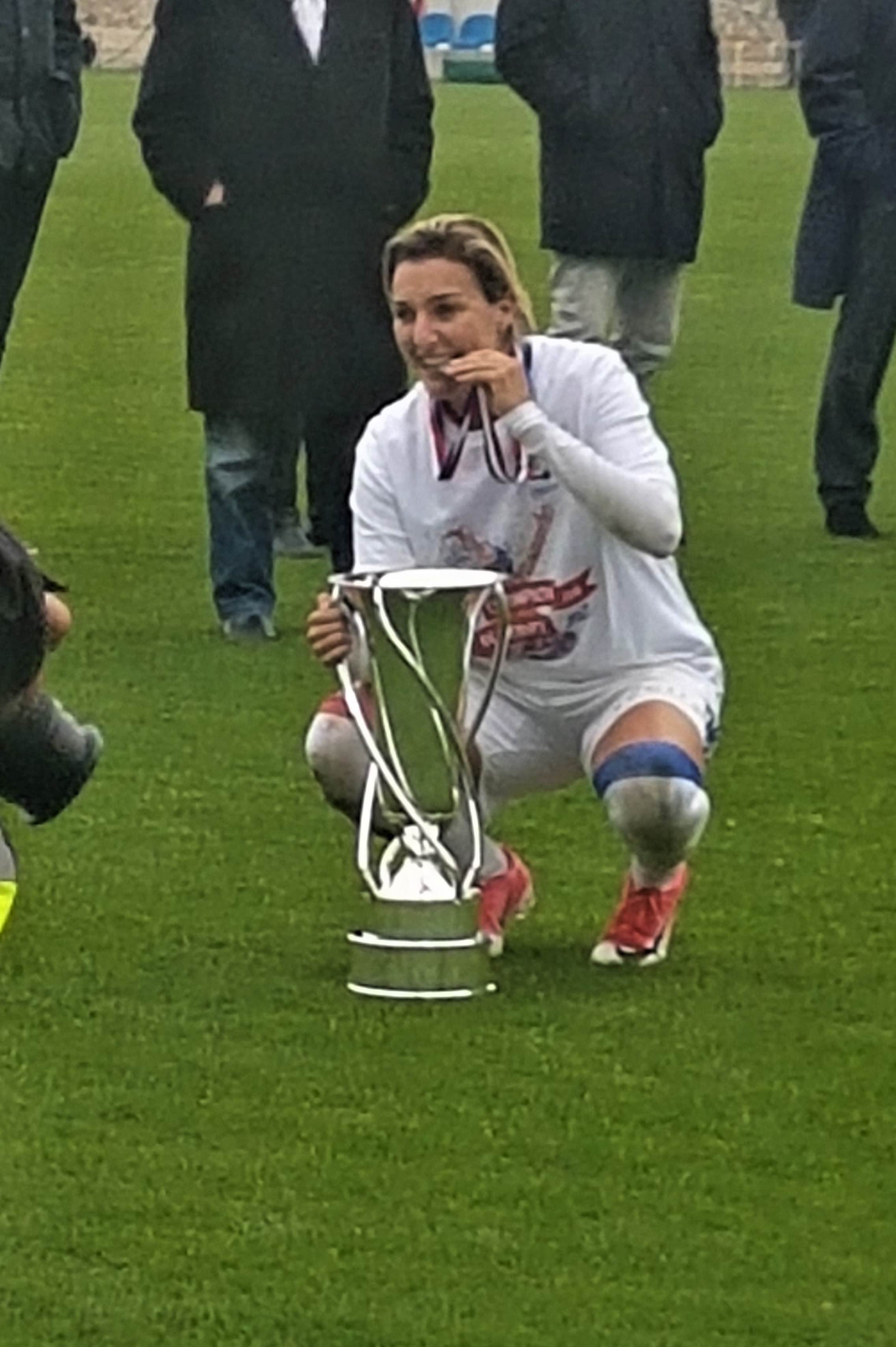 Claire Lavogez lors de la célébration du titre le 8 mai 2017.